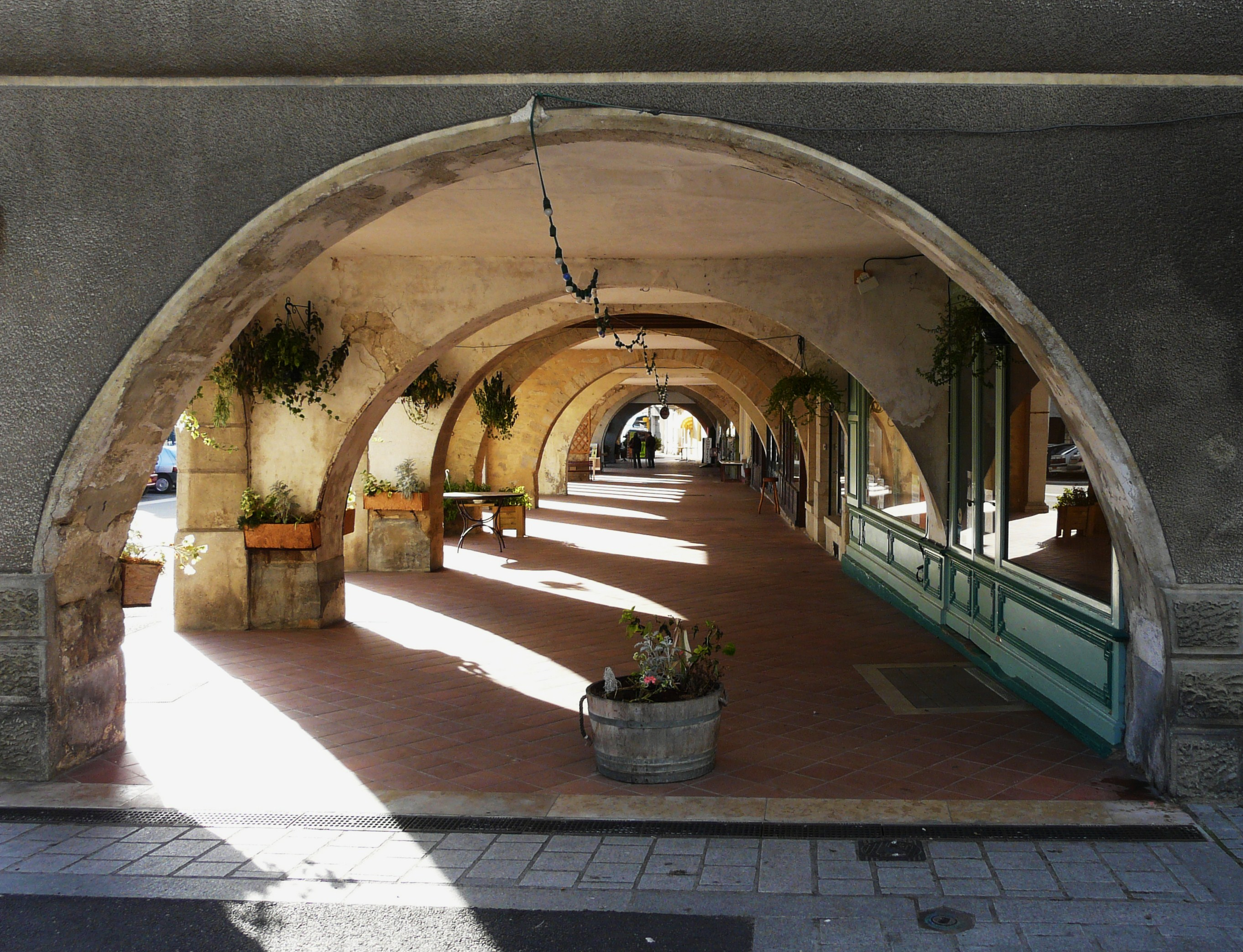 Galerie à arcades, Monségur, Gironde, France